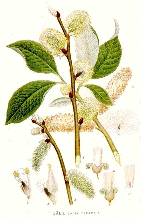 Original Description Sälg, Salix caprea L.